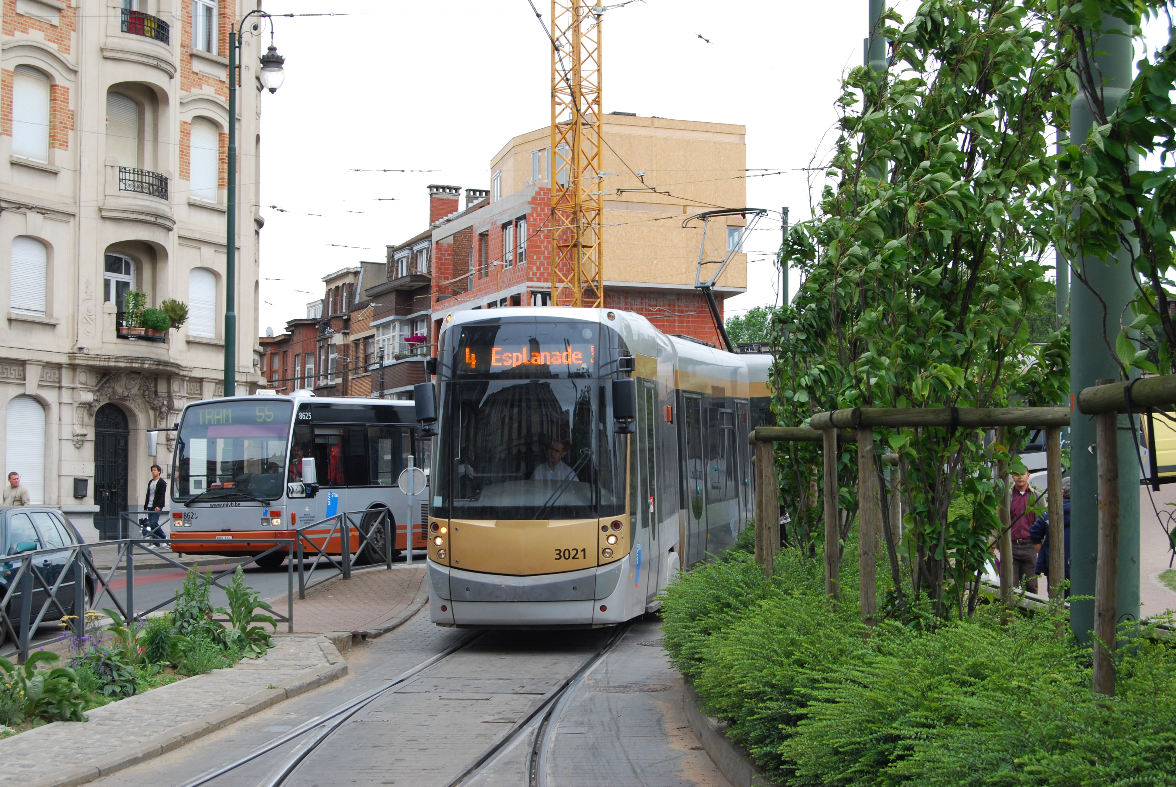 Ligne 4 déviée par la Cage aux Ours suite à des travaux sur le Quai des Usines.